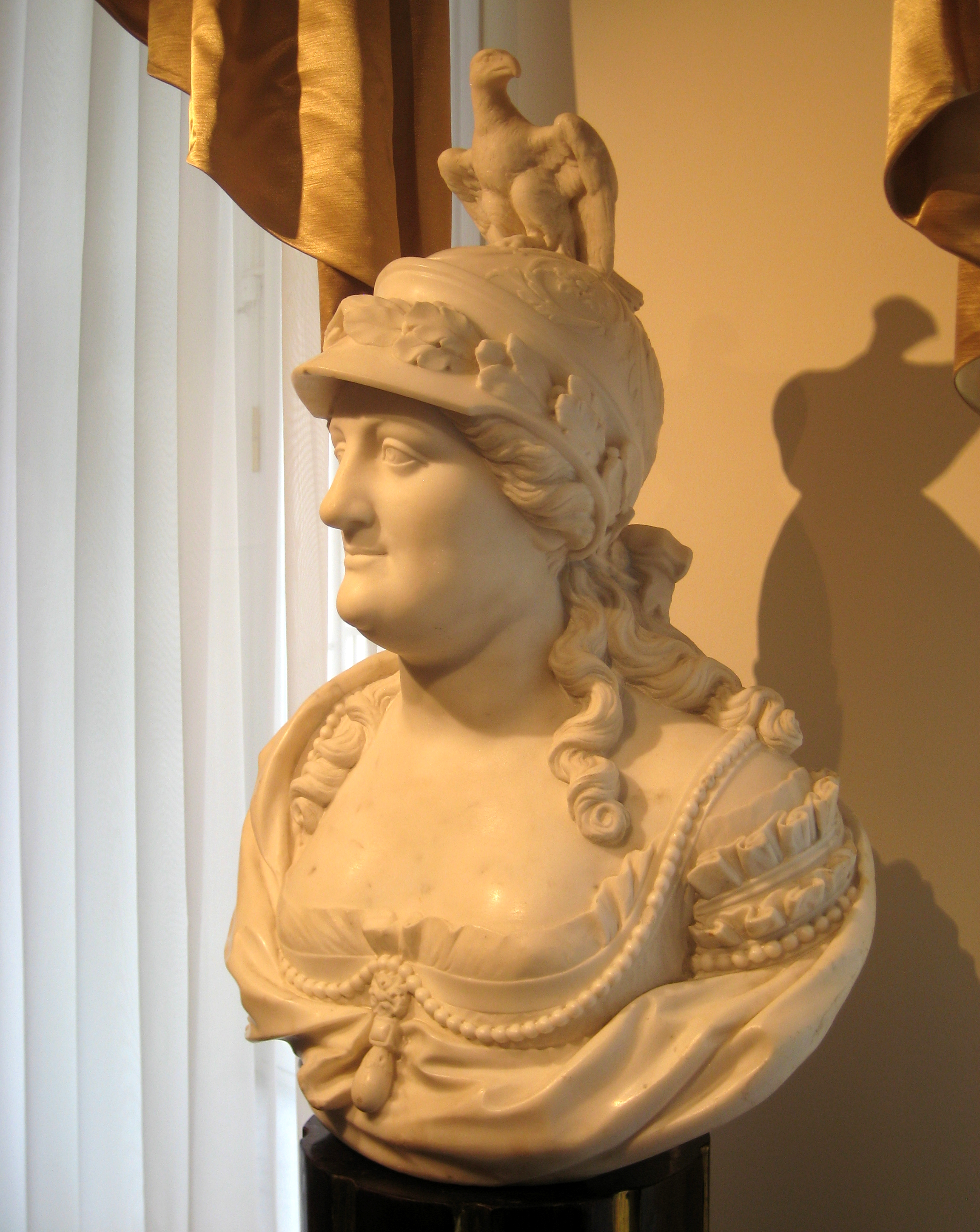 Бюст Екатерины II в образе Минервы. Музей Тропинина